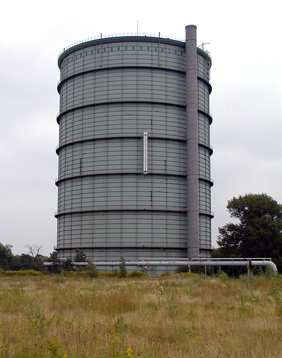 Gasometer der Zeche Minister Stein in Dortmund. (am 10.05.2005 gesprengt)